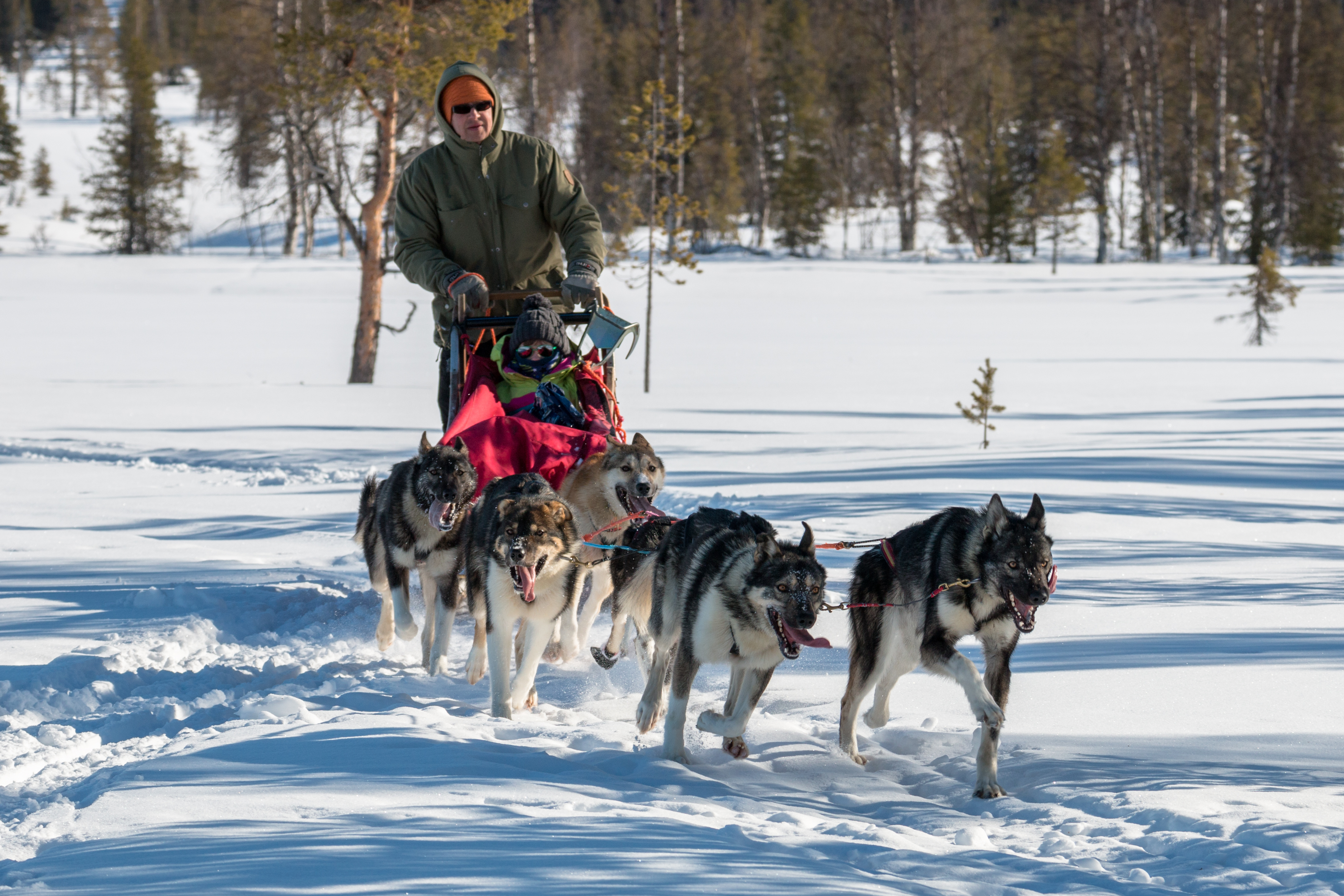 Husky Express